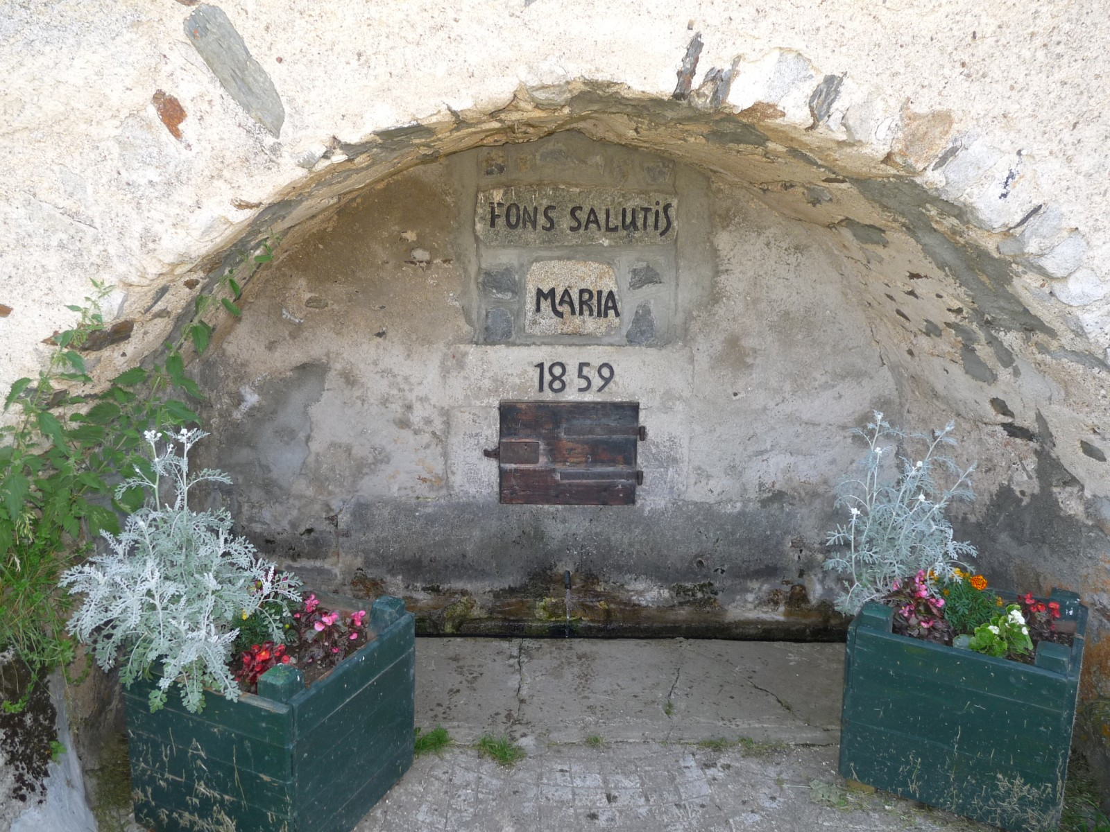 Fontaine dédiée à la Vierge, Chapelle de Villeneuve, Formiguères, Pyrénées-Orientales, France